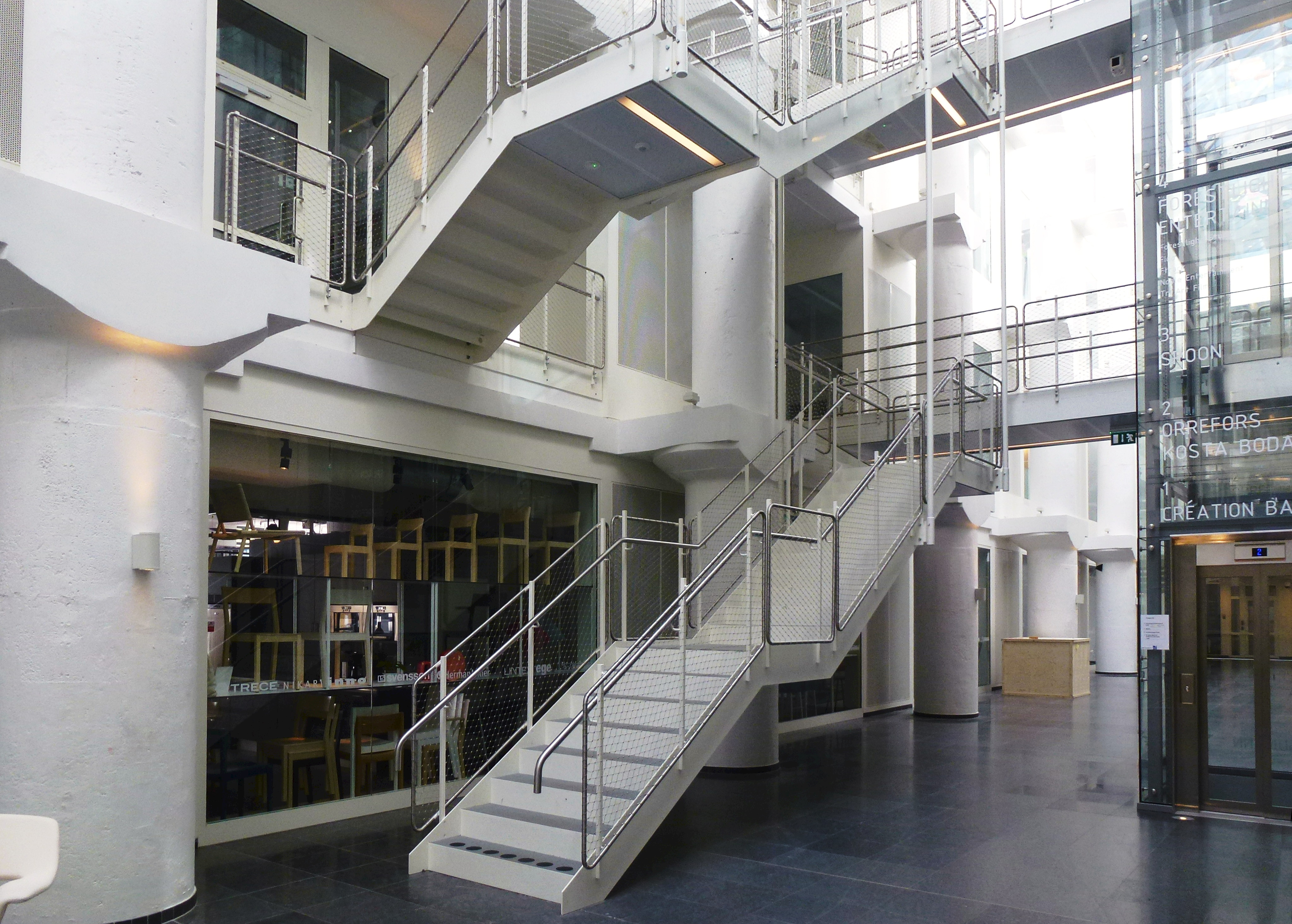 Tobaksmonopolets gamla magasinsbyggnad, ombyggnad